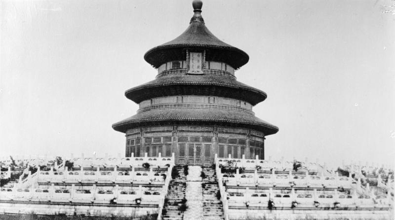 China, Peking.- Himmelstempel